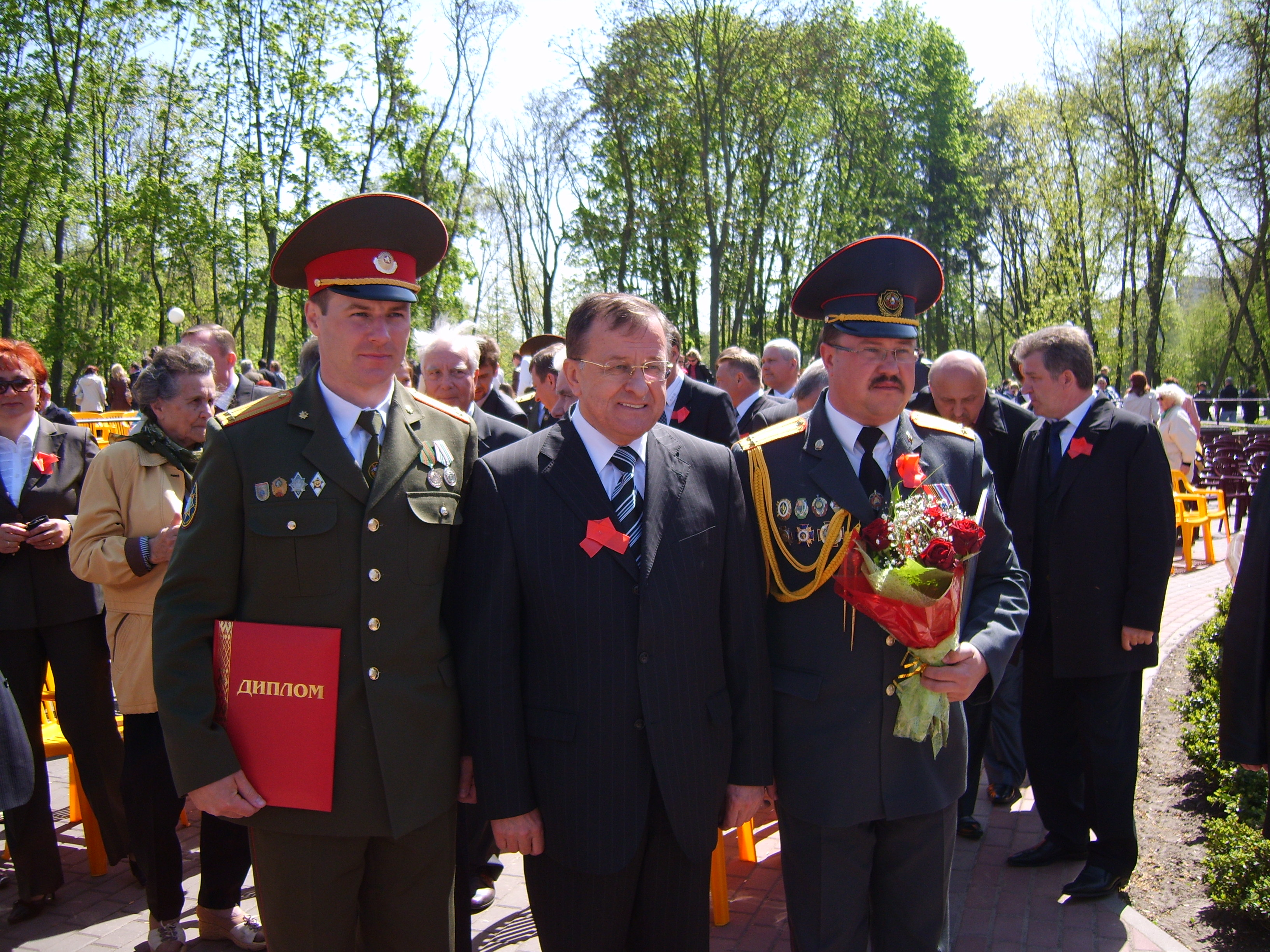 Присвоение почетного звания "Человек года 2008"